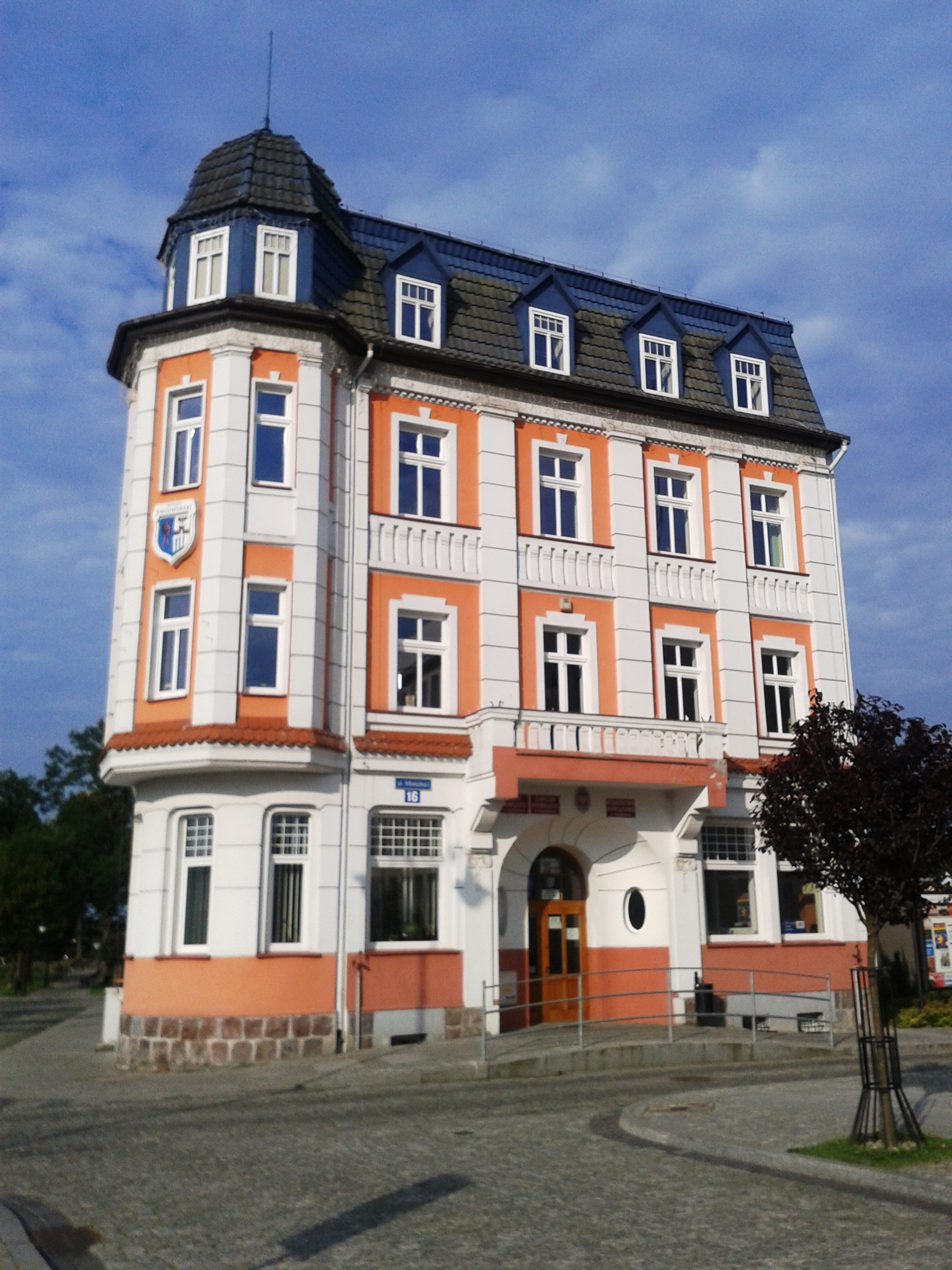 Świdwin-starostwo powiatowe